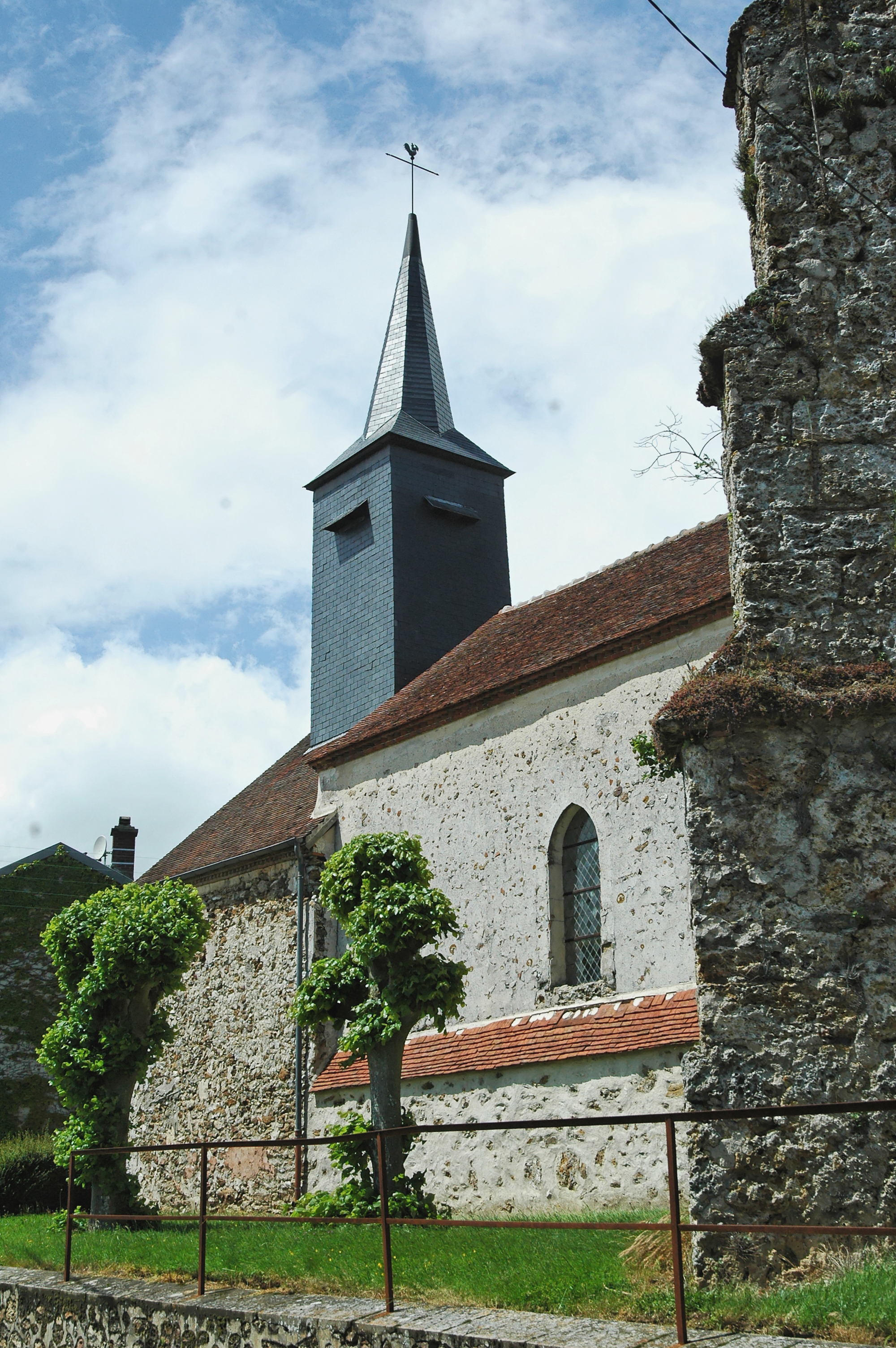 Église de Fontenelle-en-Brie.